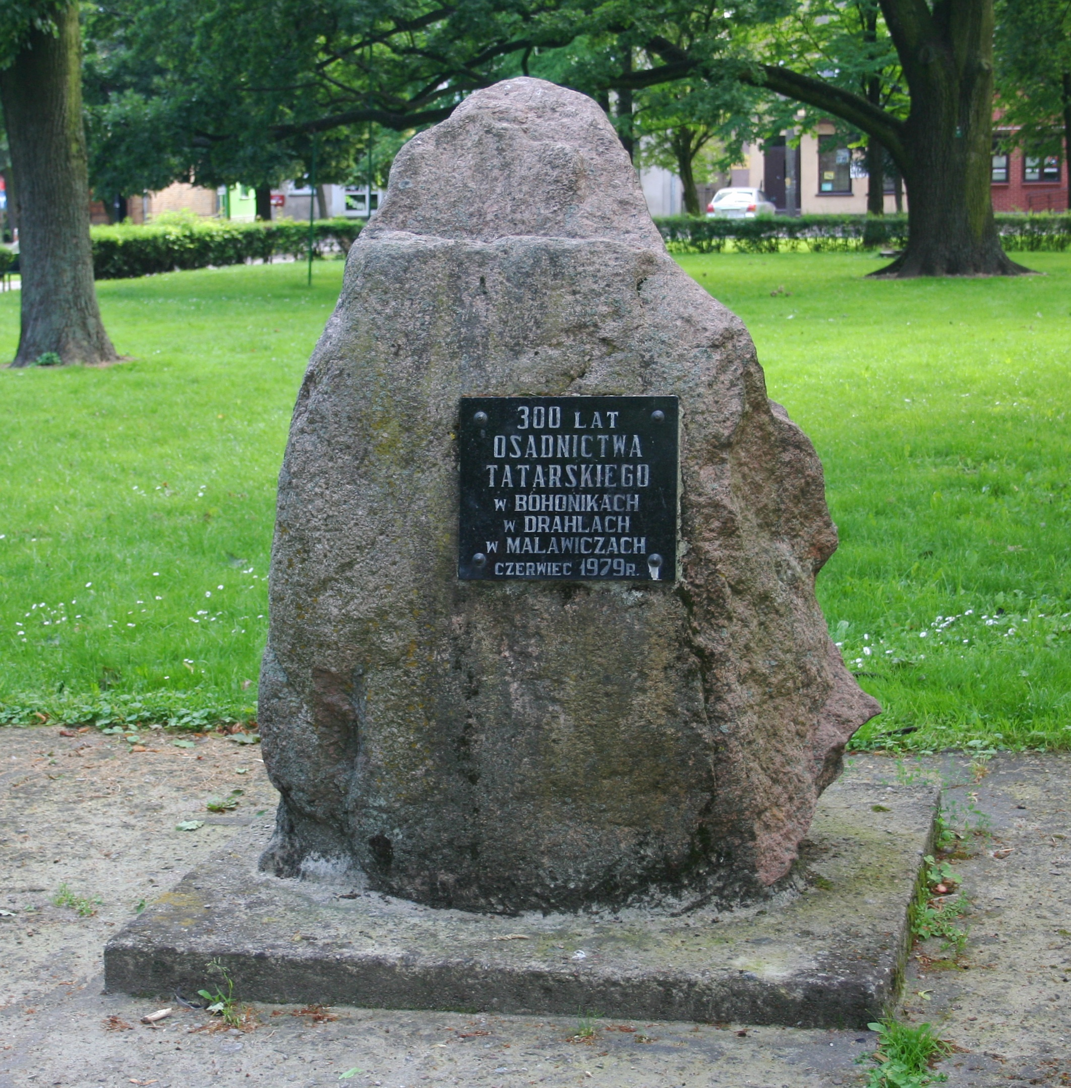 Pomnik 300 lat osadnictwa tatarskiego w Sokółce, woj. podlaskie - pomnik z 1979 roku